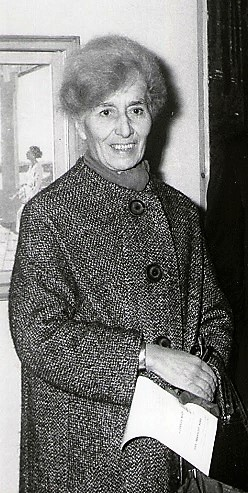 Luisa Becherucci